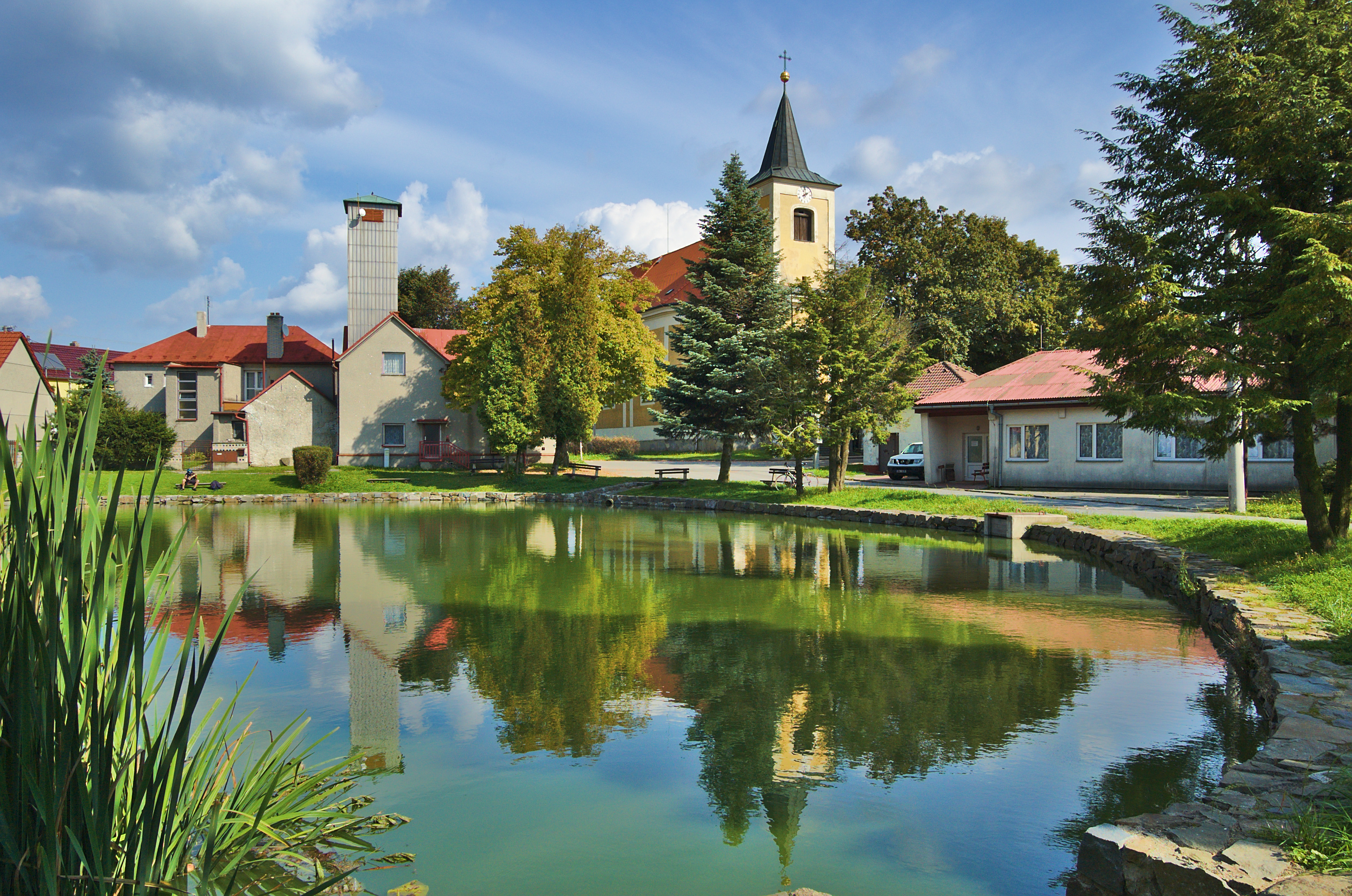 Kostel svatého Jana Křtitele, Drahany, okres Prostějov